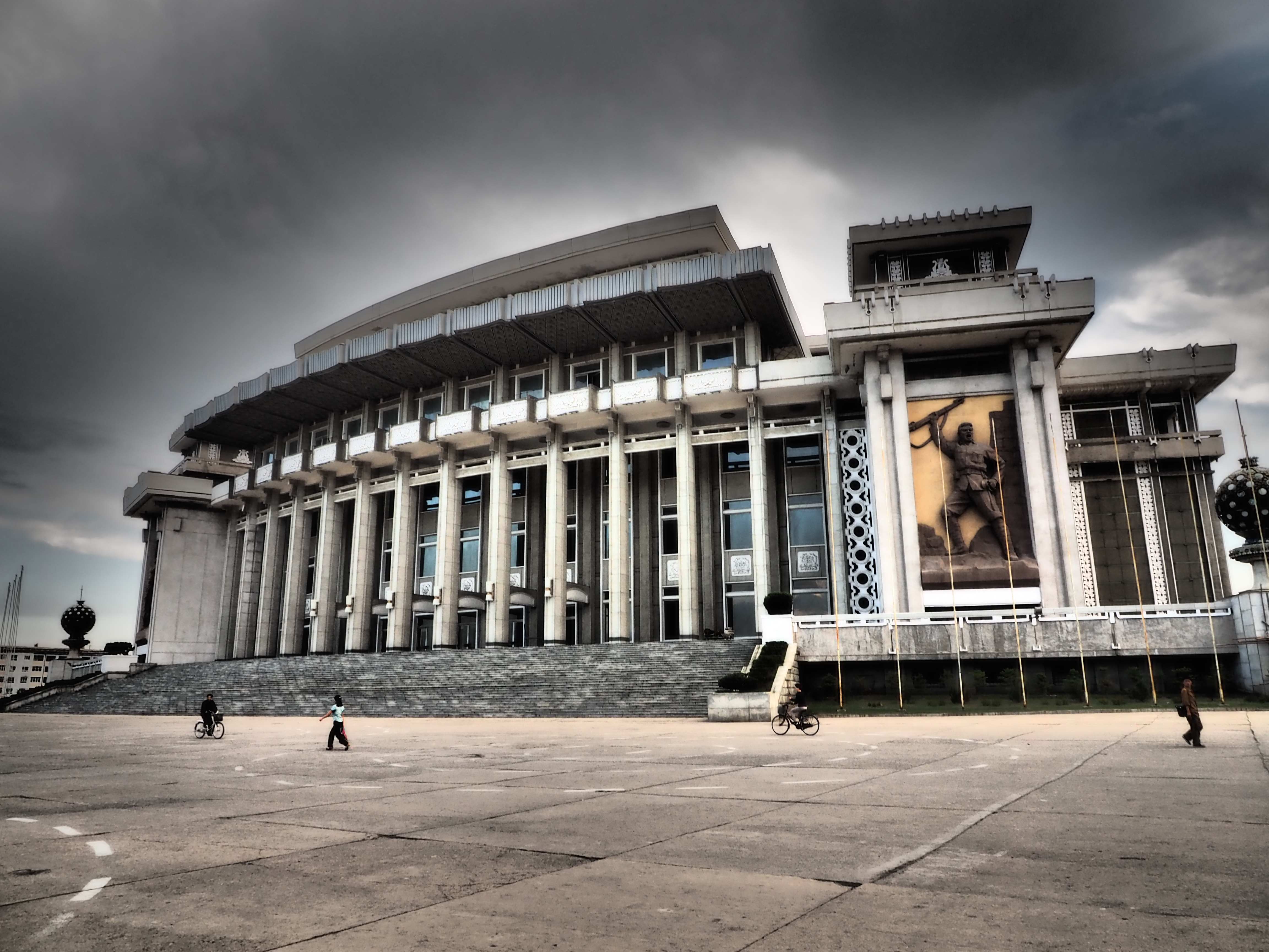 Hamhung, DPRK